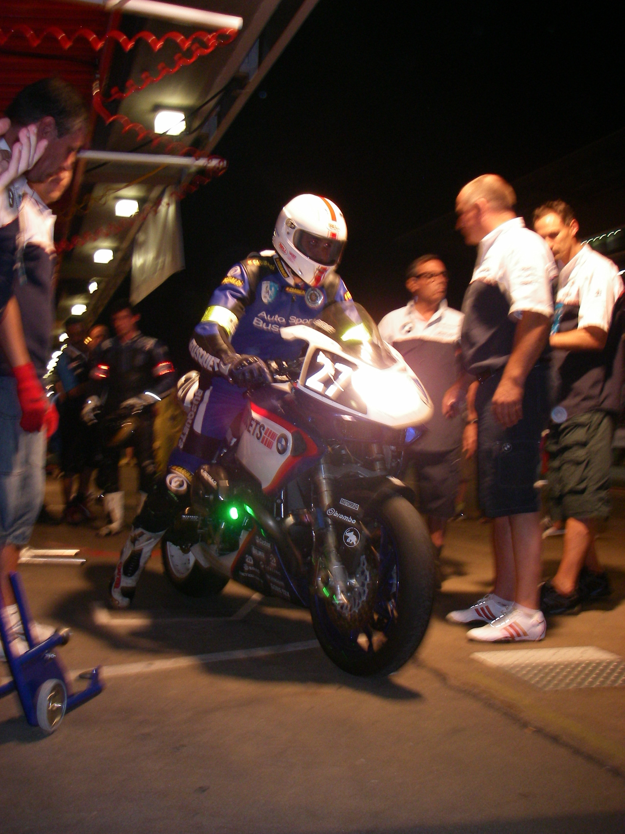 BMW HP2 Sport, Boxenstop bei den 24 horas de Montmelo(Circuit de Catalunya)